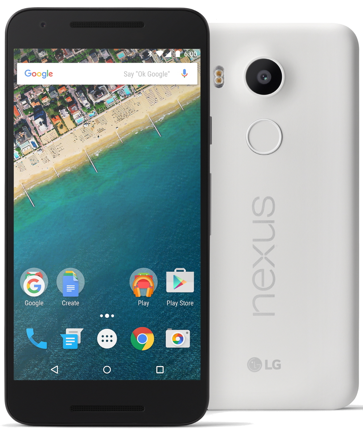 LG전자, ‘넥서스 5X’ 국내 출시 ■ 20일부터 이통 3사 통해 출시… 출고가 16GB 508,200원, 32GB 568,700원 ■ 폰아레나 설문조사 ‘역대 최고의 넥서스 파트너’… LG전자 압도적 1위 ※ Social LG전자 ( 에서 관련 보도자료를 확인하실 수 있습니다.